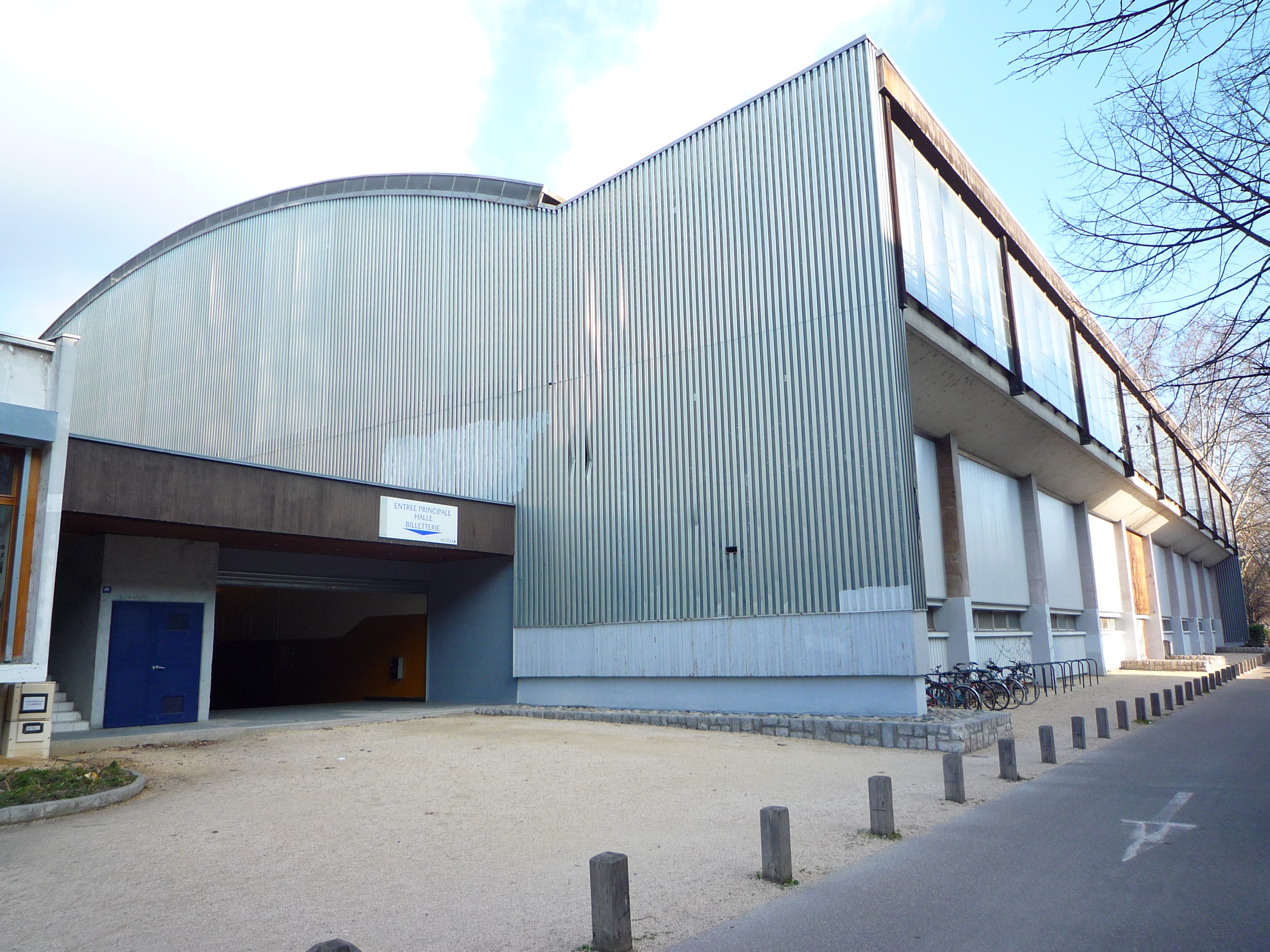 Hall Clémenceau - Grenoble